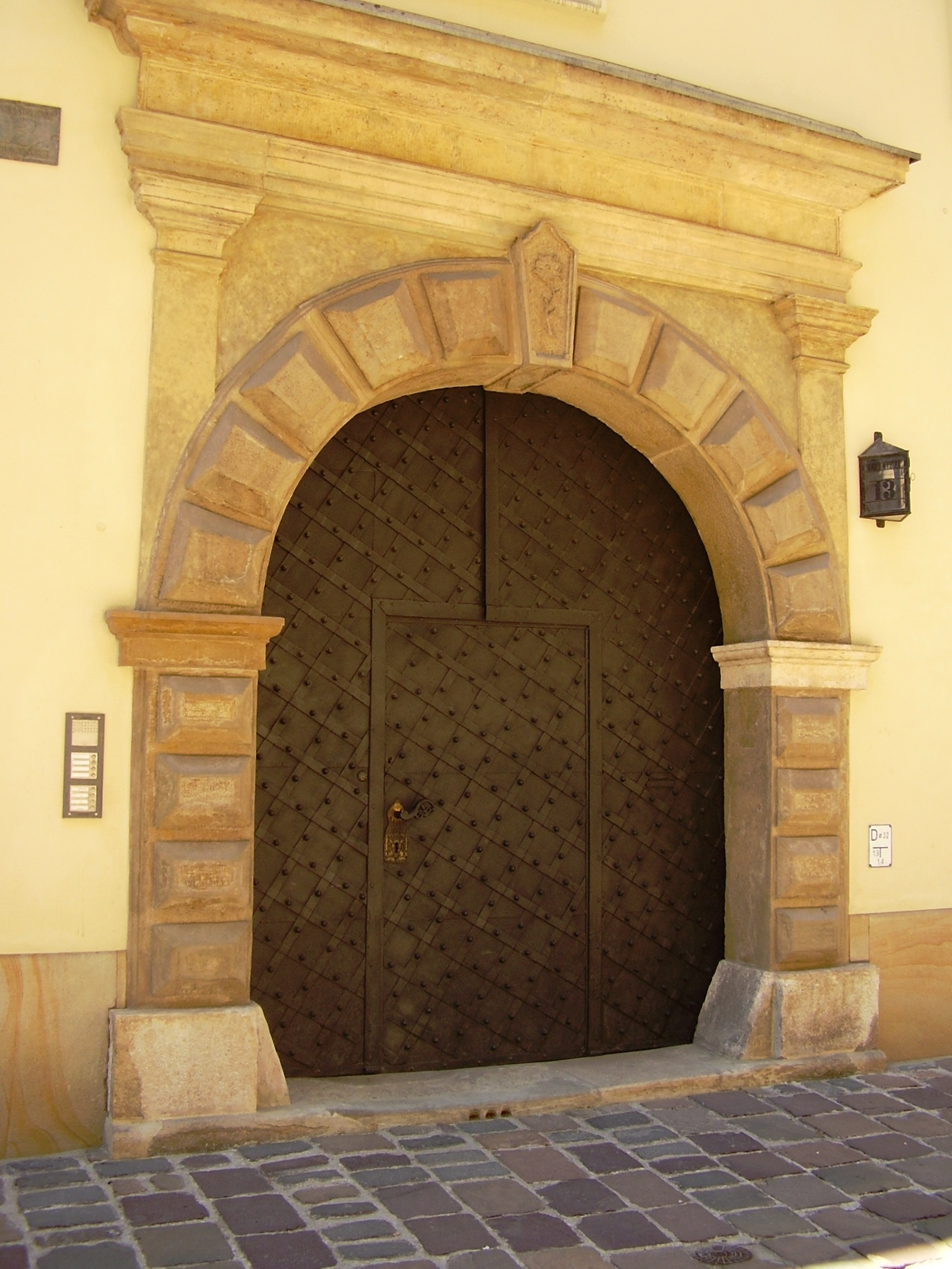 Kraków, Poland